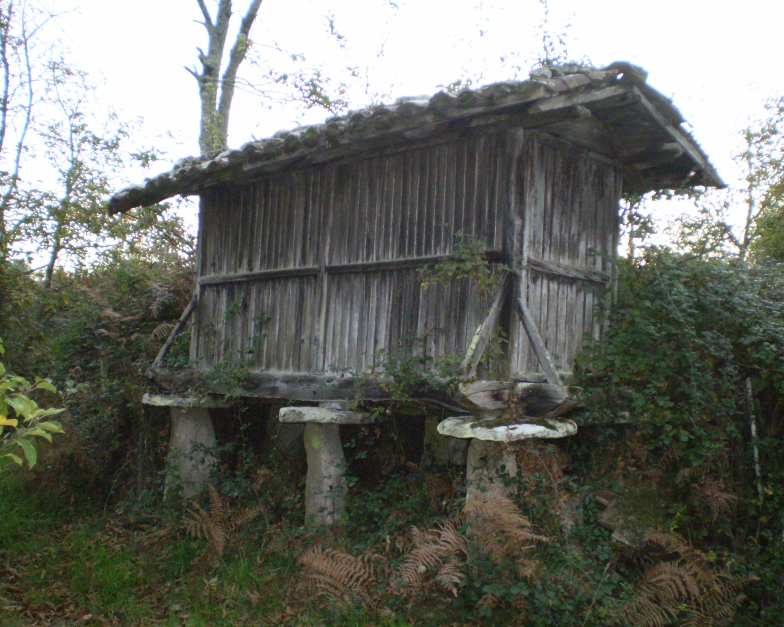 Hórreo de madeira, sobre seis esteos cilíndricos. Porta penal. Ubicado no lugar de A Regueira, parroquia de Facha (Antas de Ulla)